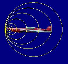 La imagen muestra el comportamiento de las ondas sonoras a la velocidad del sonido